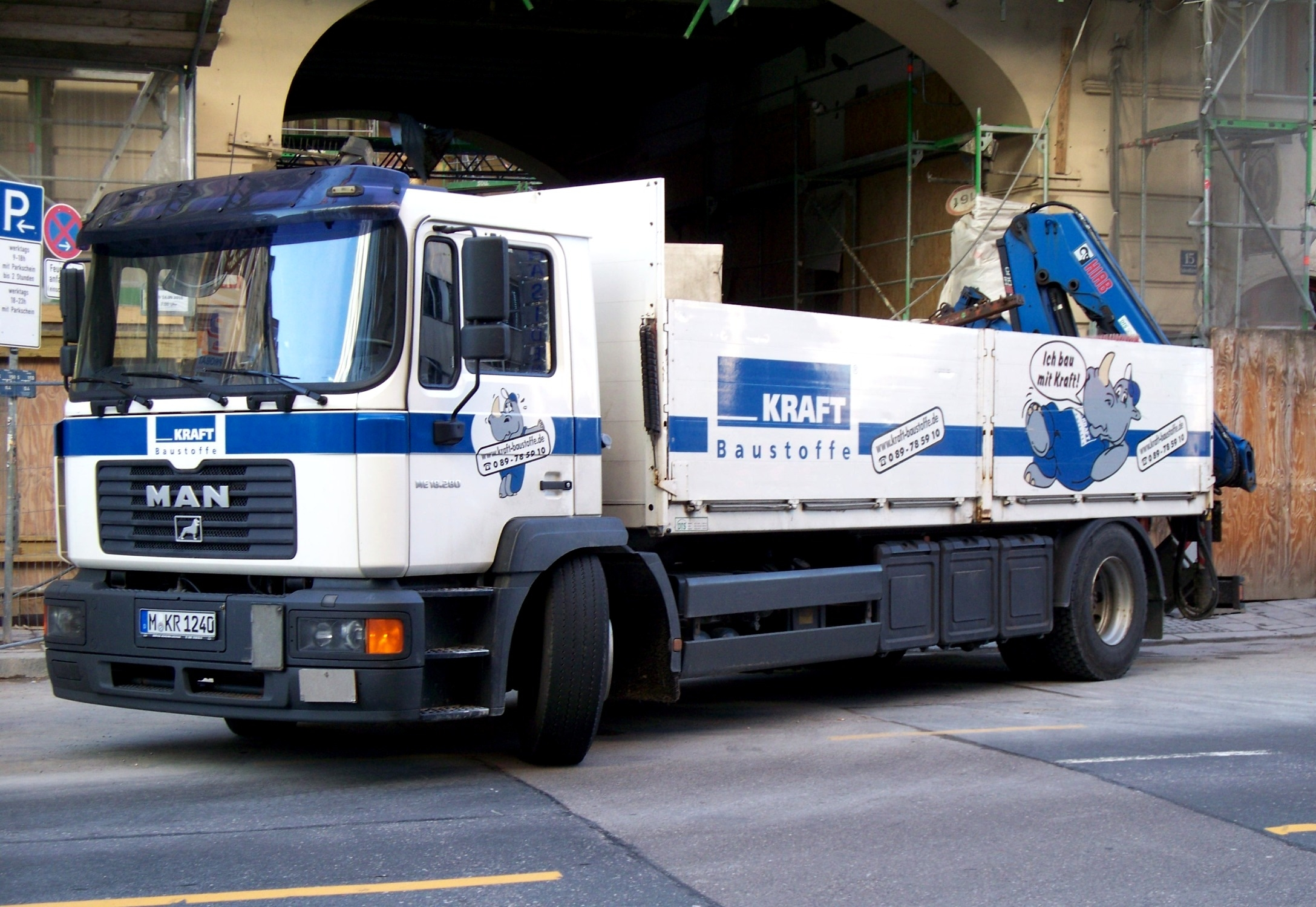 Ein Lastkraftwagen vom Hersteller MAN des Typs ME 18.280 in München.